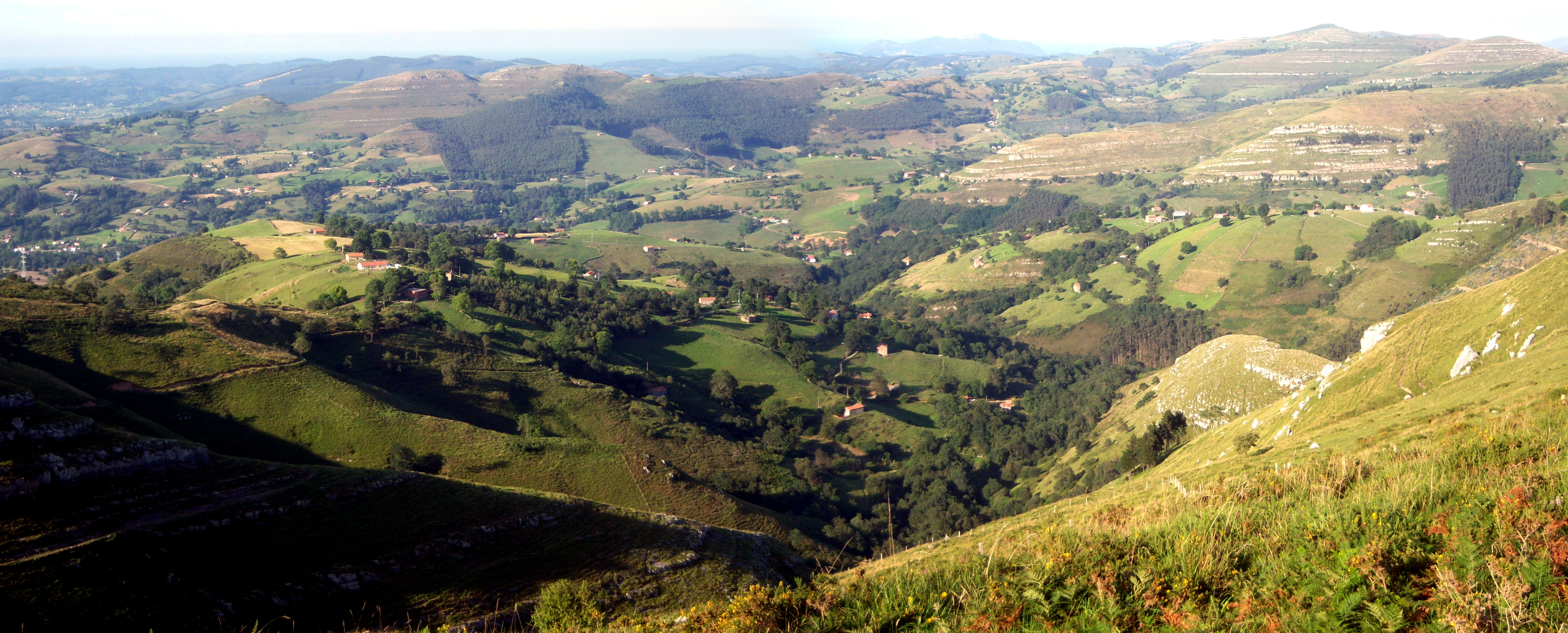 Vista del municipio de Riotuerto desde el alto de La Linde. En primer término el alto de Moncobe. Al fondo Camposdelante.